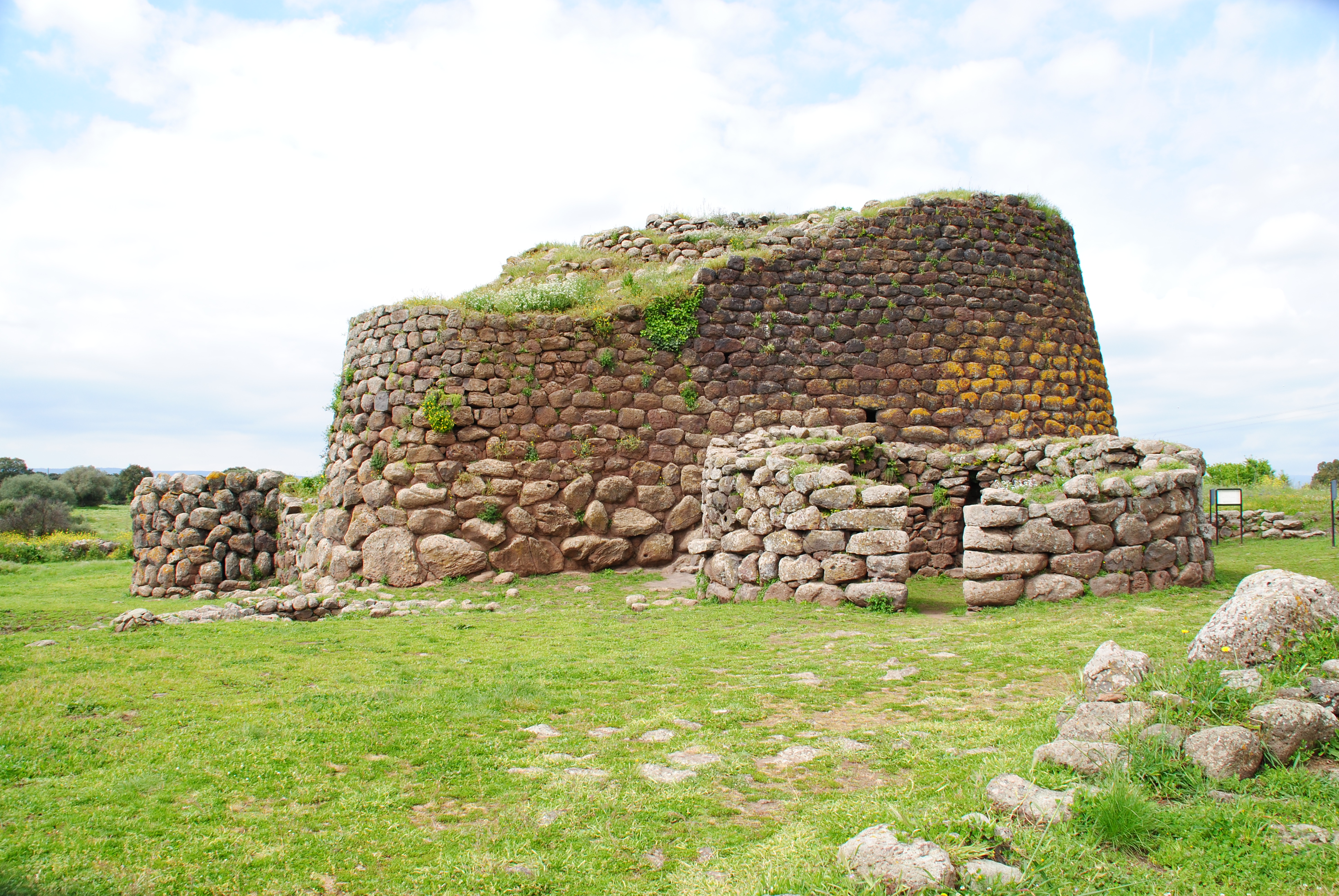 Nuraghe Losa This is a photo of a monument which is part of cultural heritage of Italy.